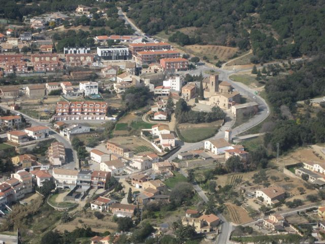 Santa Eulàlia des de l'aire. Parròquia i Barri de La Sagrera.